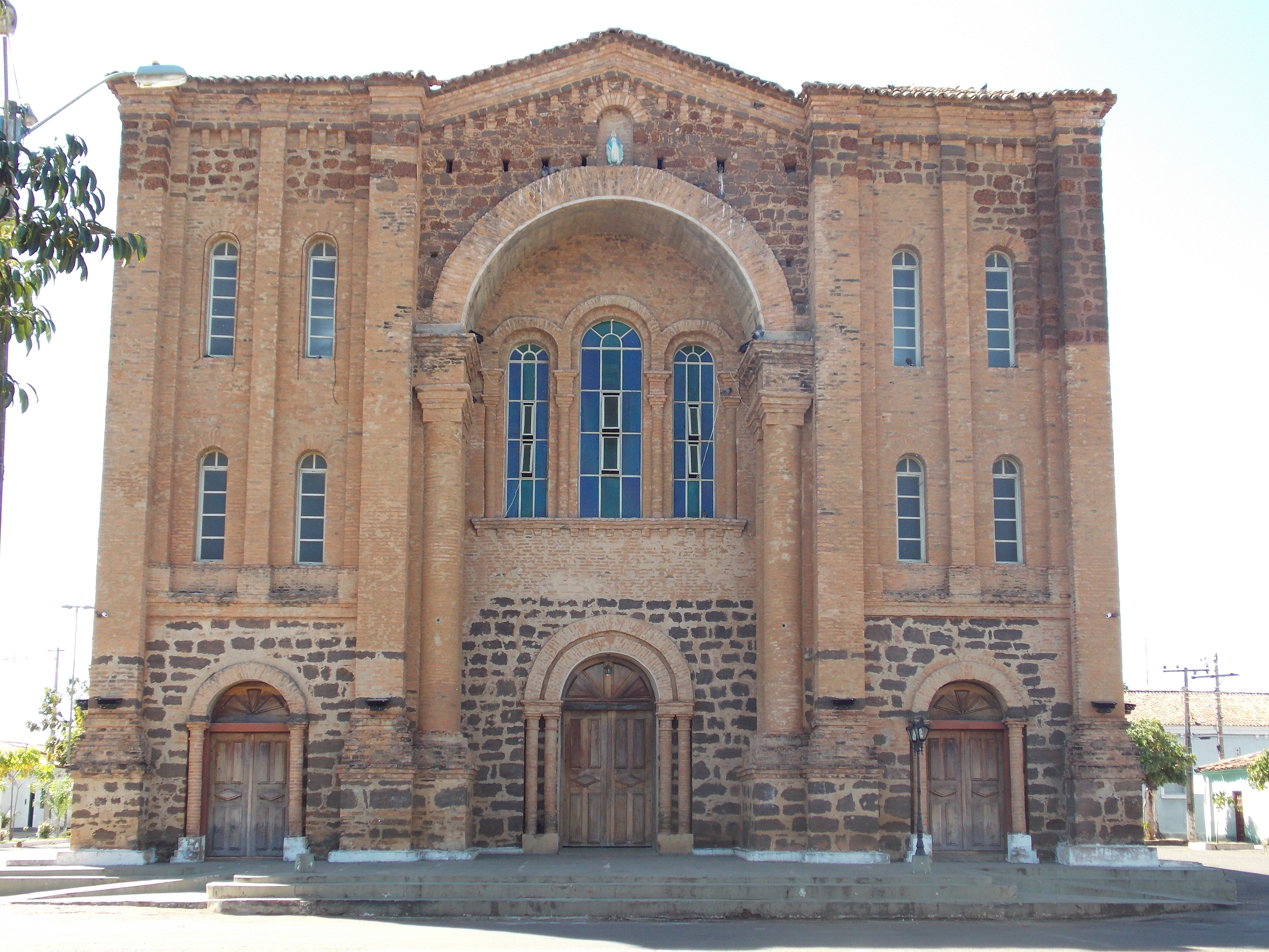 Núcleo Histórico de Porto Nacional